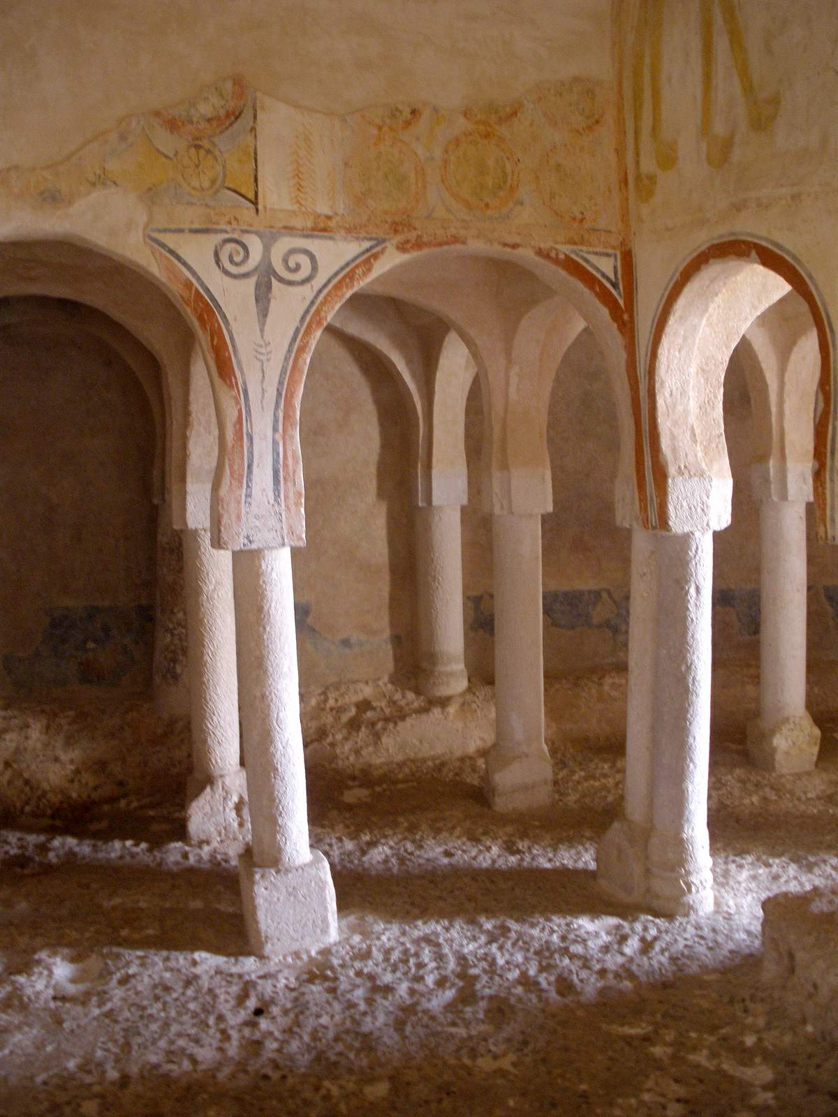 Ermita mozárabe de San Baudelio de Berlanga (Soria)